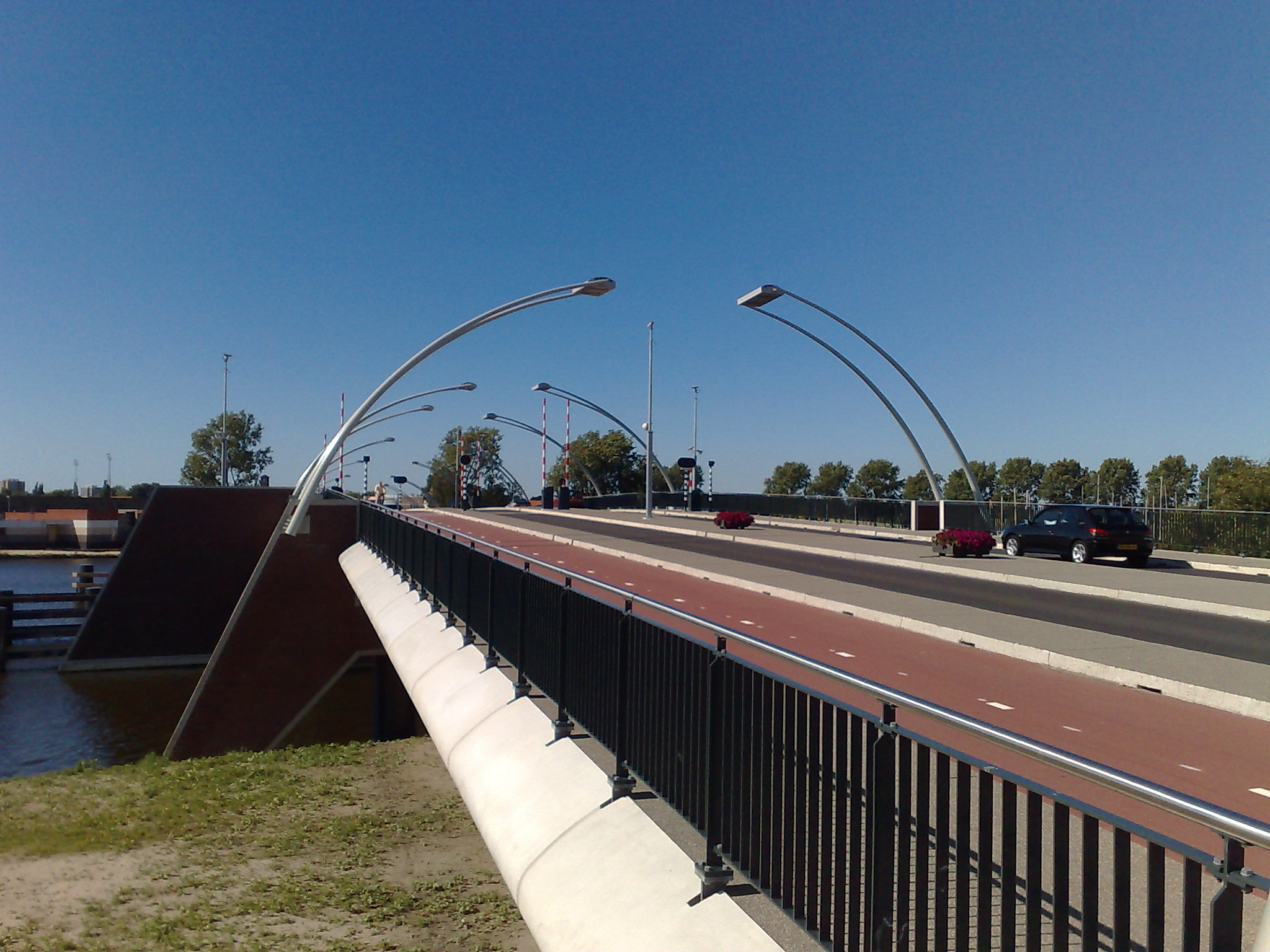 foto van OP de Schoterbrug